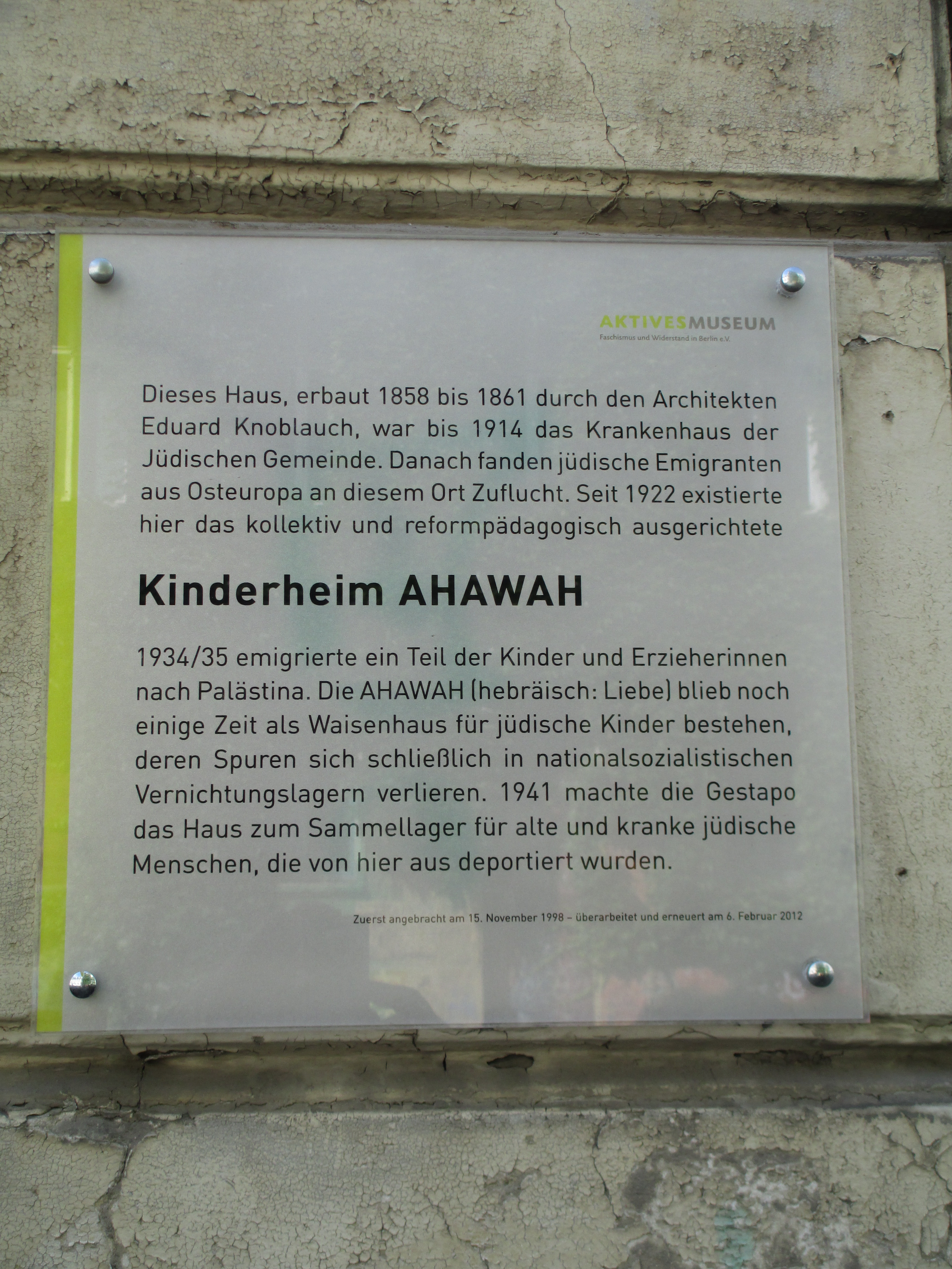 לוחית זיכרון לבית הילדים אהבה בברלין